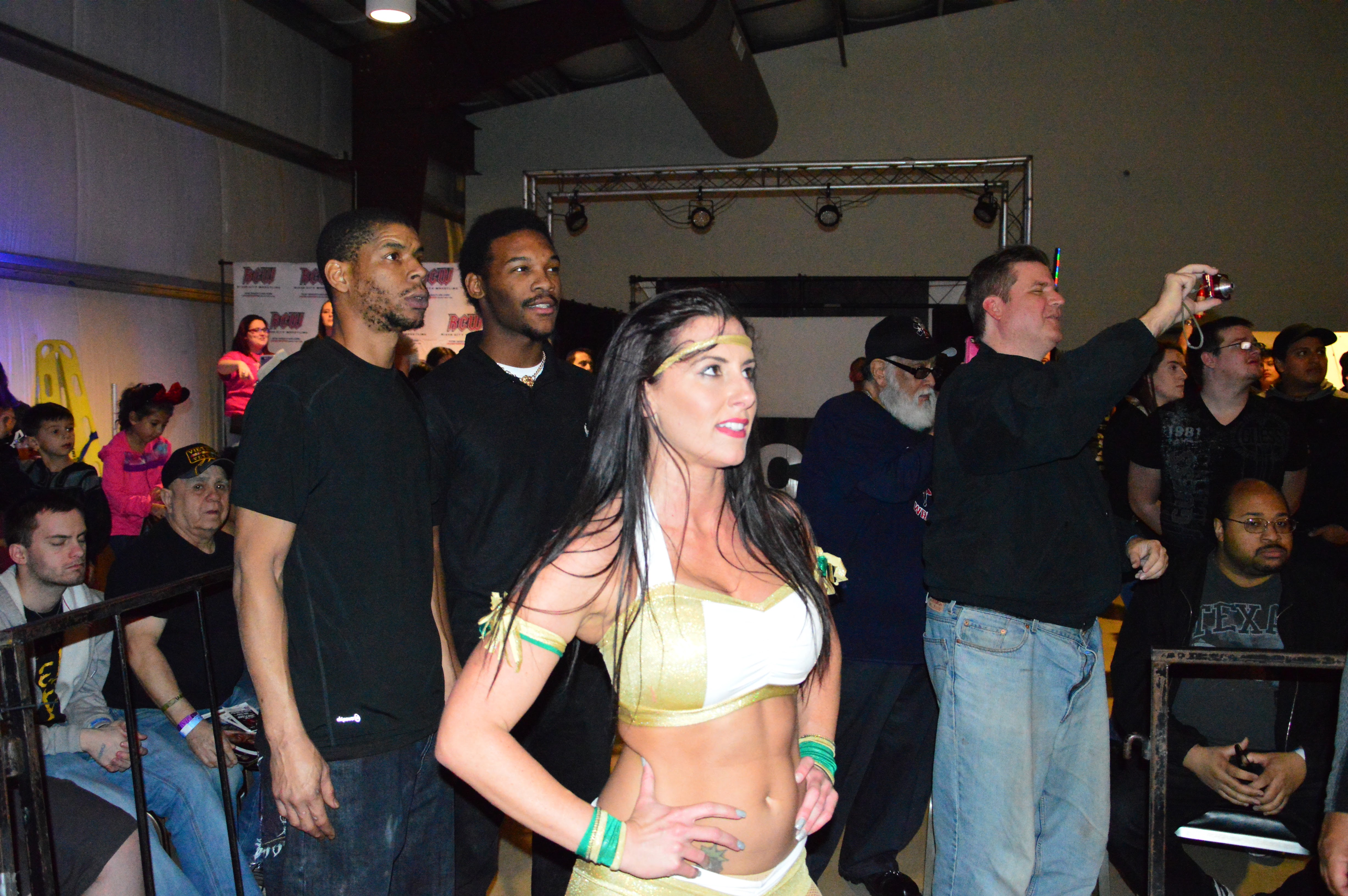 La catcheuse Santana Garrett aux abords d'un ring de catch en 2017